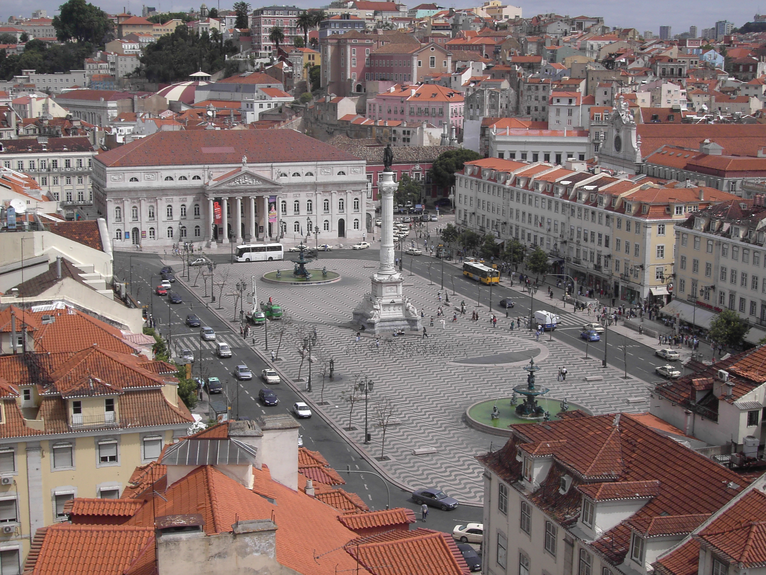 Lisboa: praça don Pedro do elevador de Santa Juxta